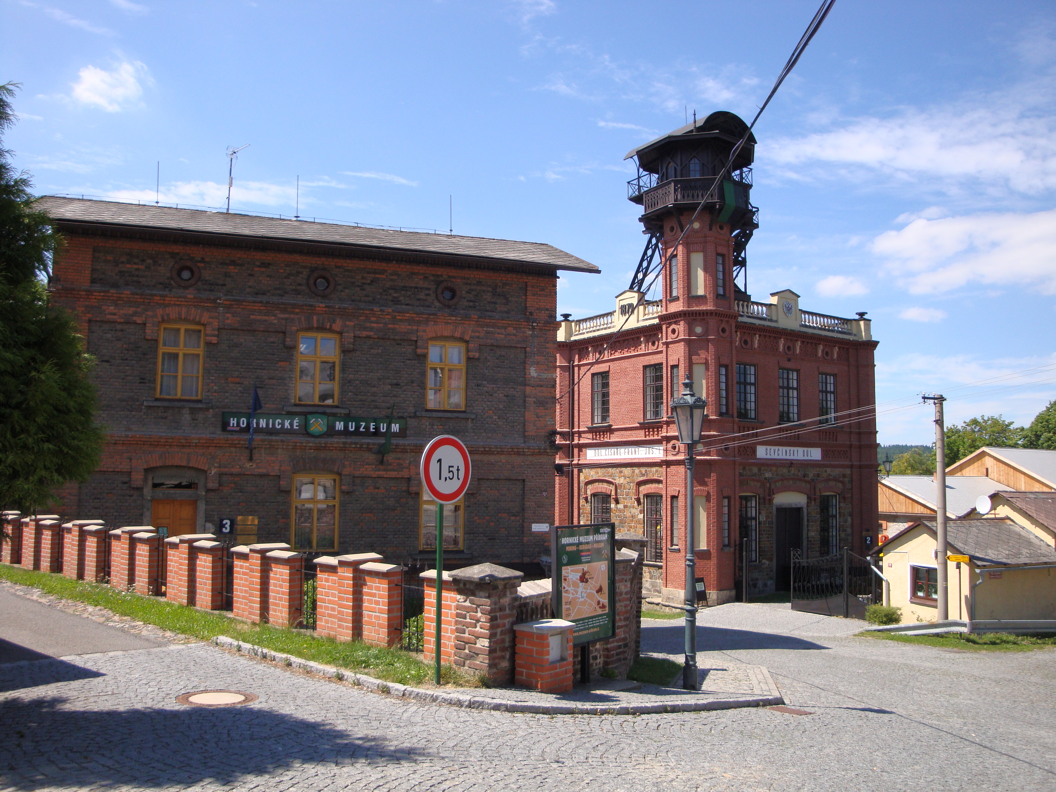 Hornické muzeum Příbram